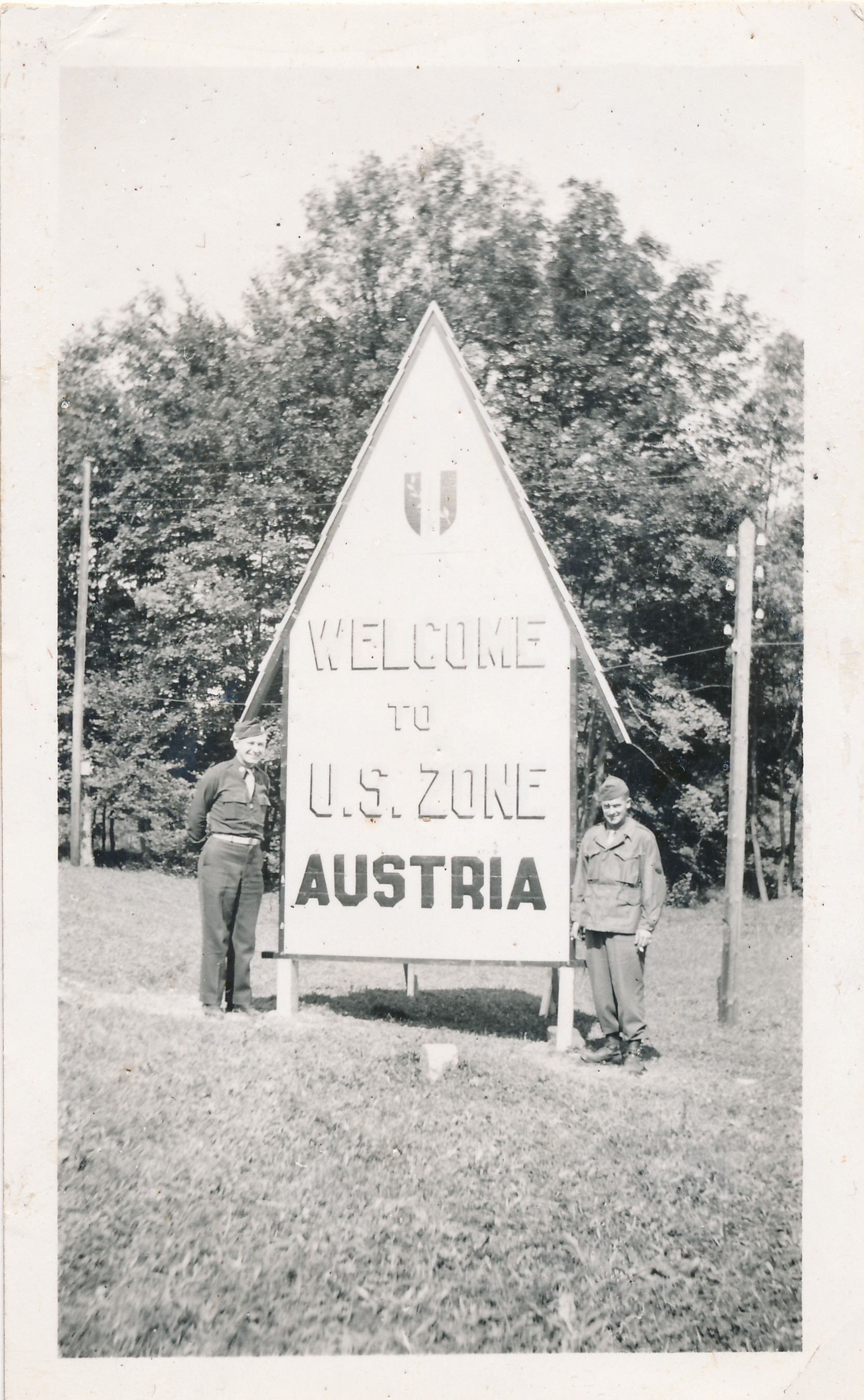 USFA in Austria, Salzburg, Oberösterreich